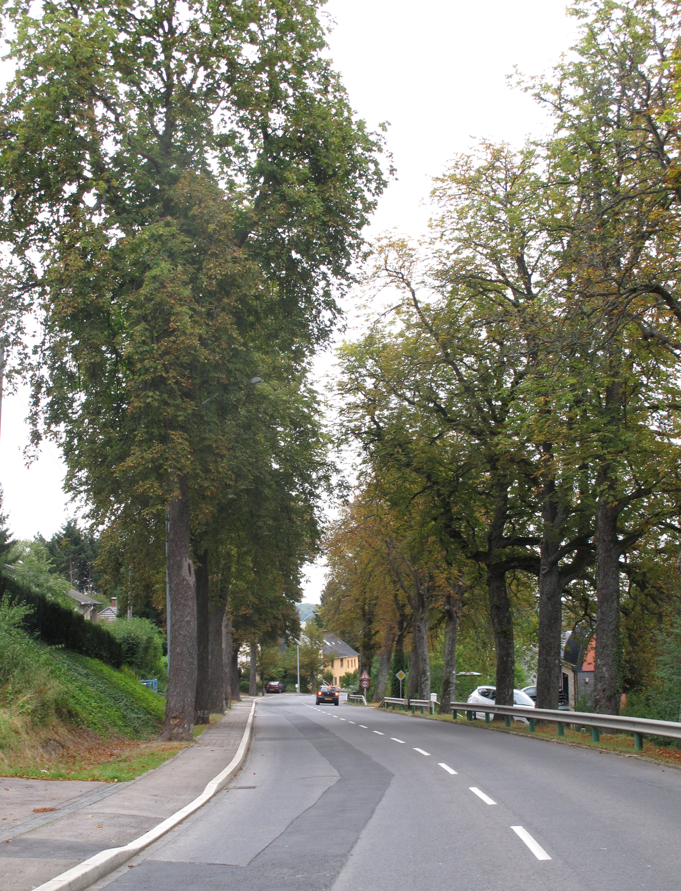 Baumallee, Triererstrasse (N1), Niederanven